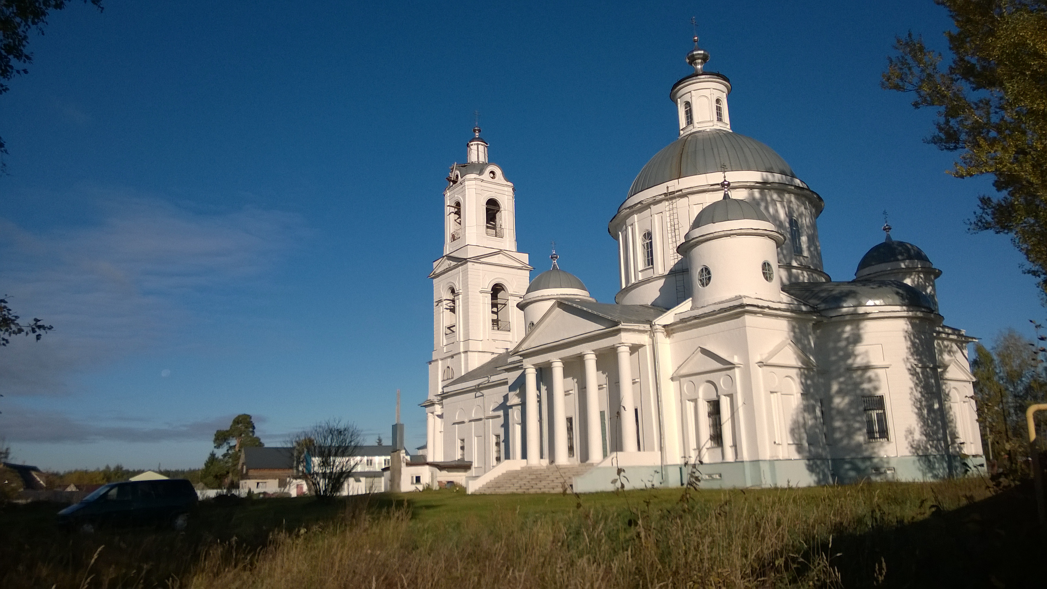 Церковь Тихвинской иконы Божией Матери: Иваново, Петушинский район, Владимирская область